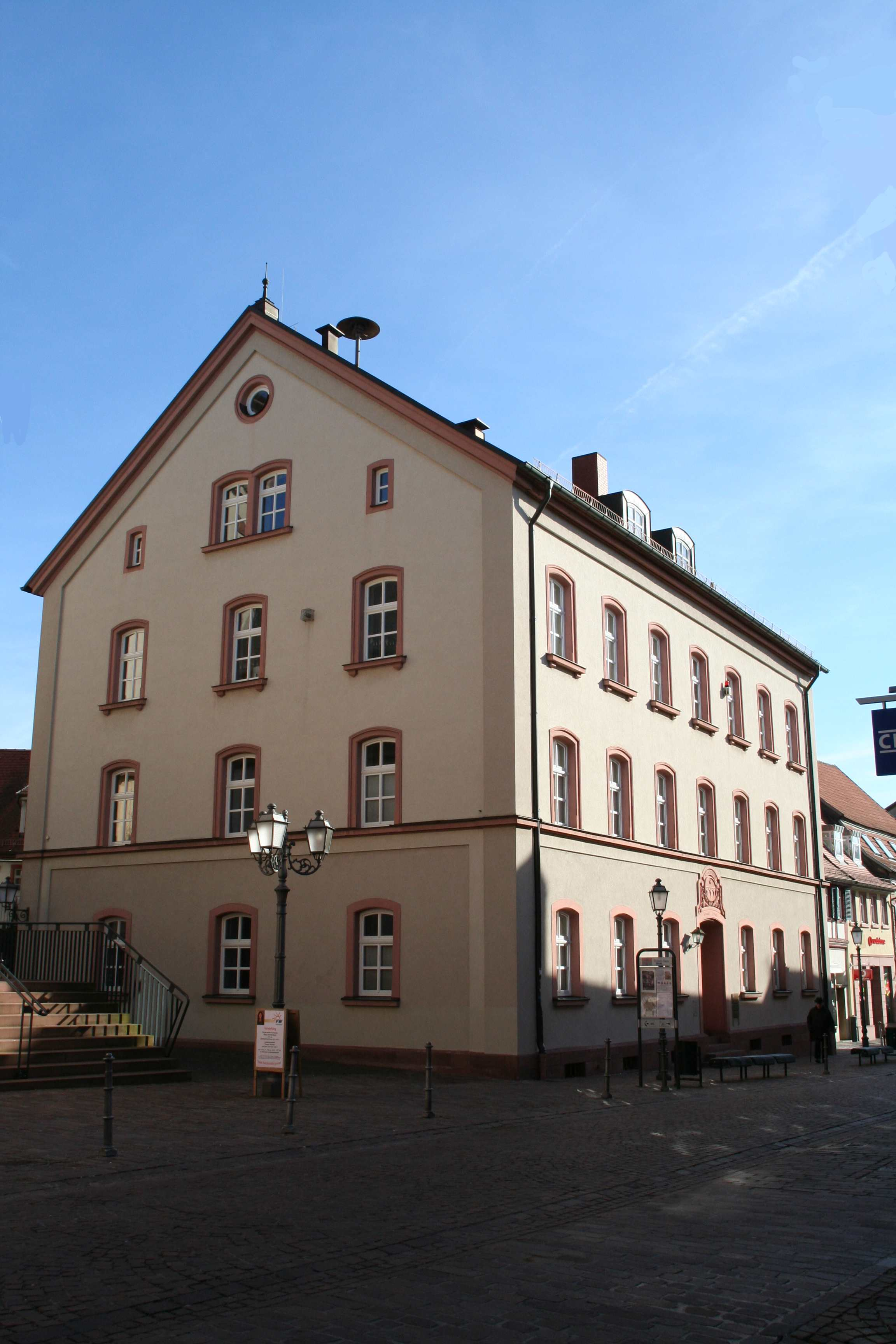 Historisches Rathaus Marktheidenfeld, Main-Spessart-Kreis, in Unterfranken